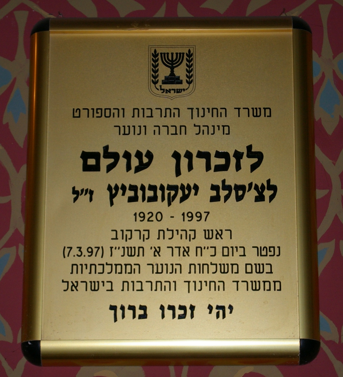 Tablica pamiętkowa w Synagodze Tempel w Krakowie